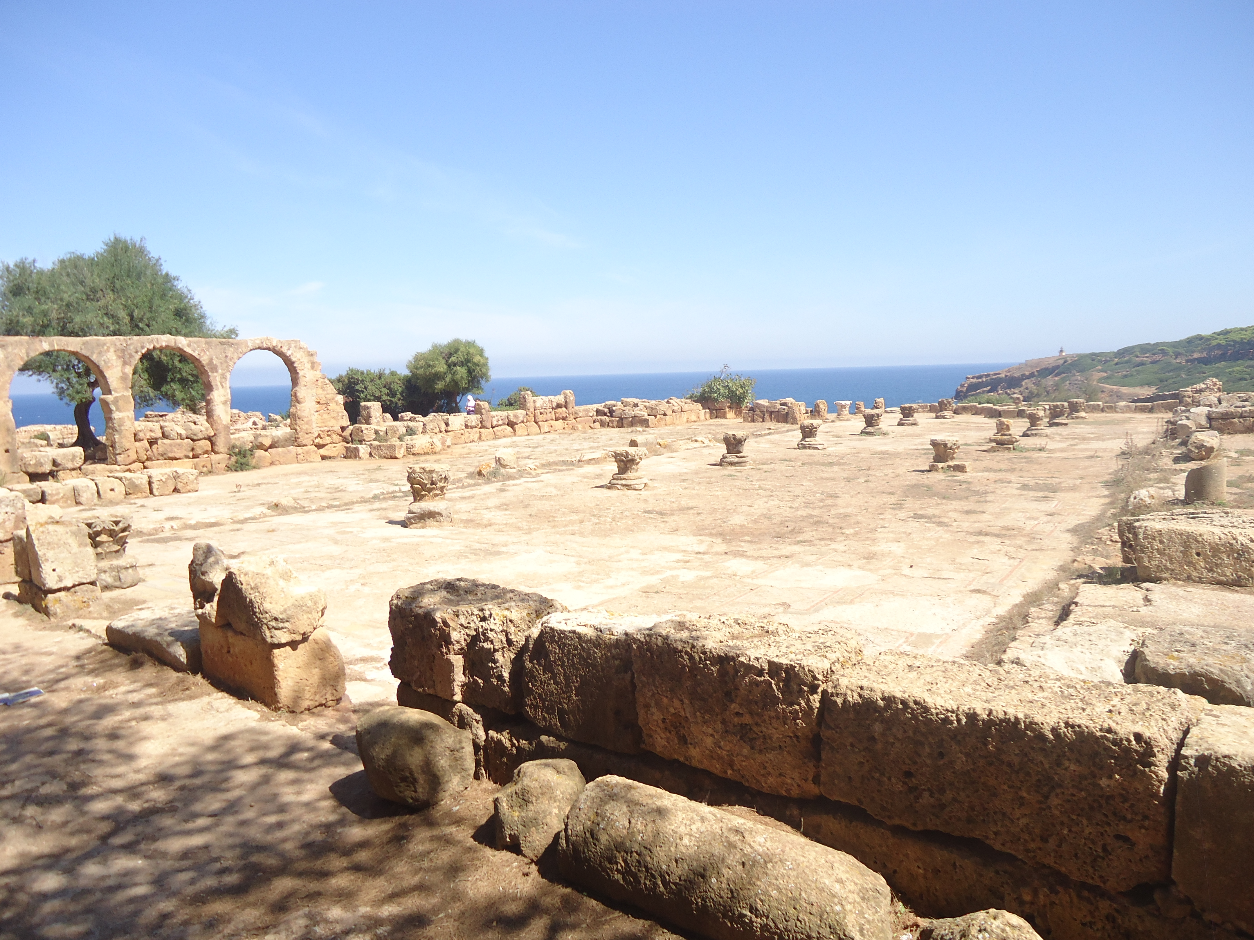 tipaza